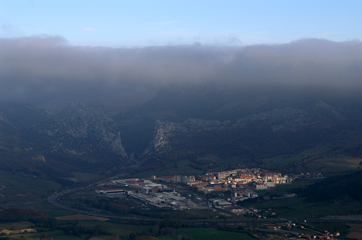 Irurtzun - Lagundu iezaguzu Nafarroako mapa osatzen/Ayúdanos a completar el mapa de Navarra